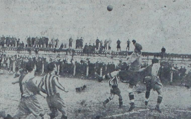 9 Mart 1941'deki Galatasaray-Fenerbahçe maçından bir görünüm.